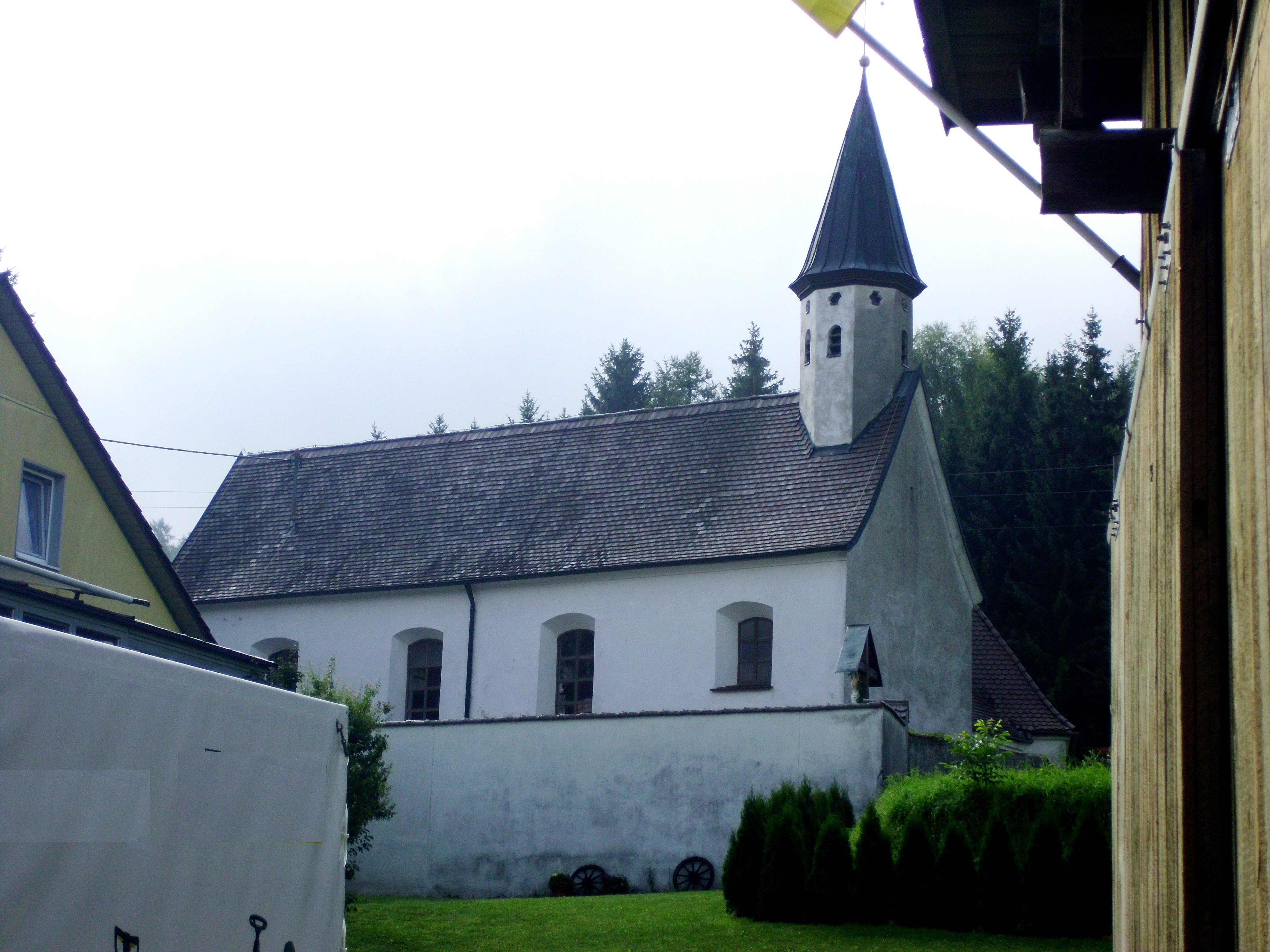 Ellenbrunn (Markt Rennertshofen) im Landkreis Neuburg-Schrobenhausen, Ortskirche St. Martin